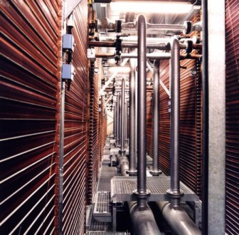 GSWT in einer Industrieanlage Werksbild SEW-GmbH D-47906 Kempen